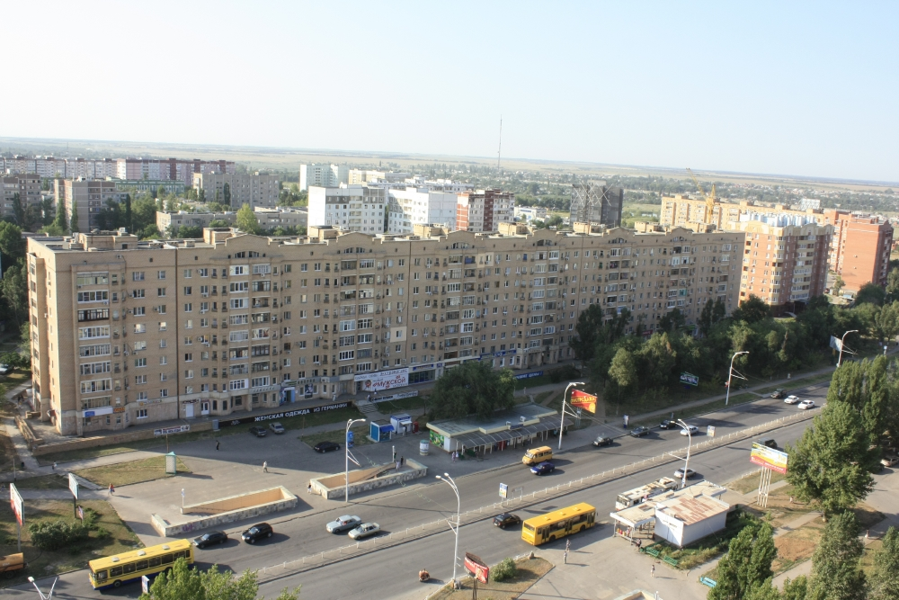 Волгодонск. Начало проспекта Строителей